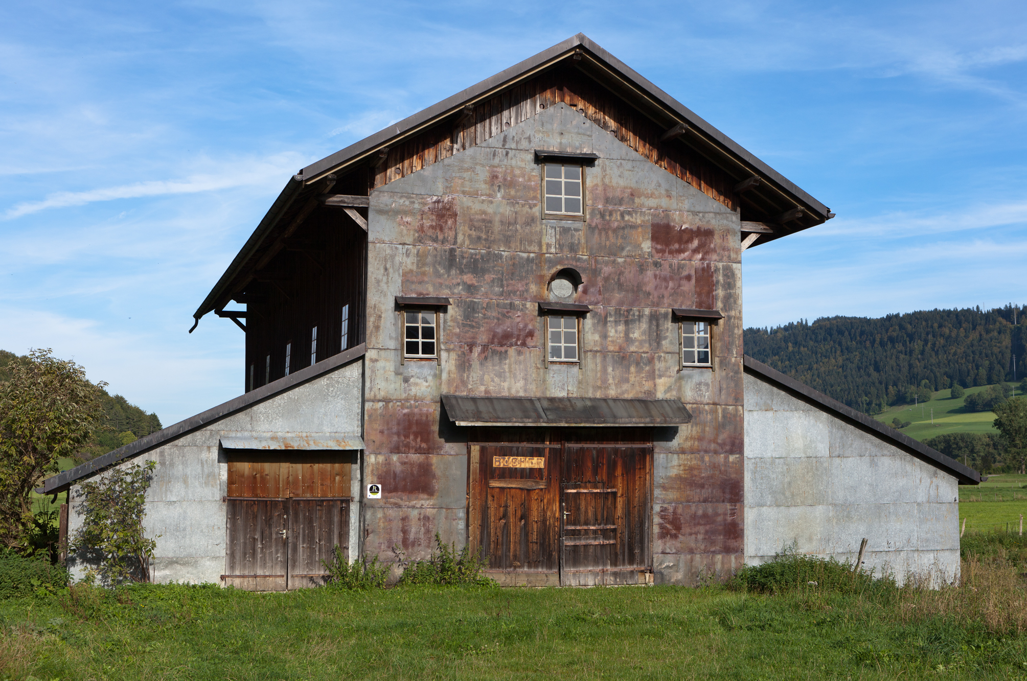 Séchoir à absinthe à Boveresse